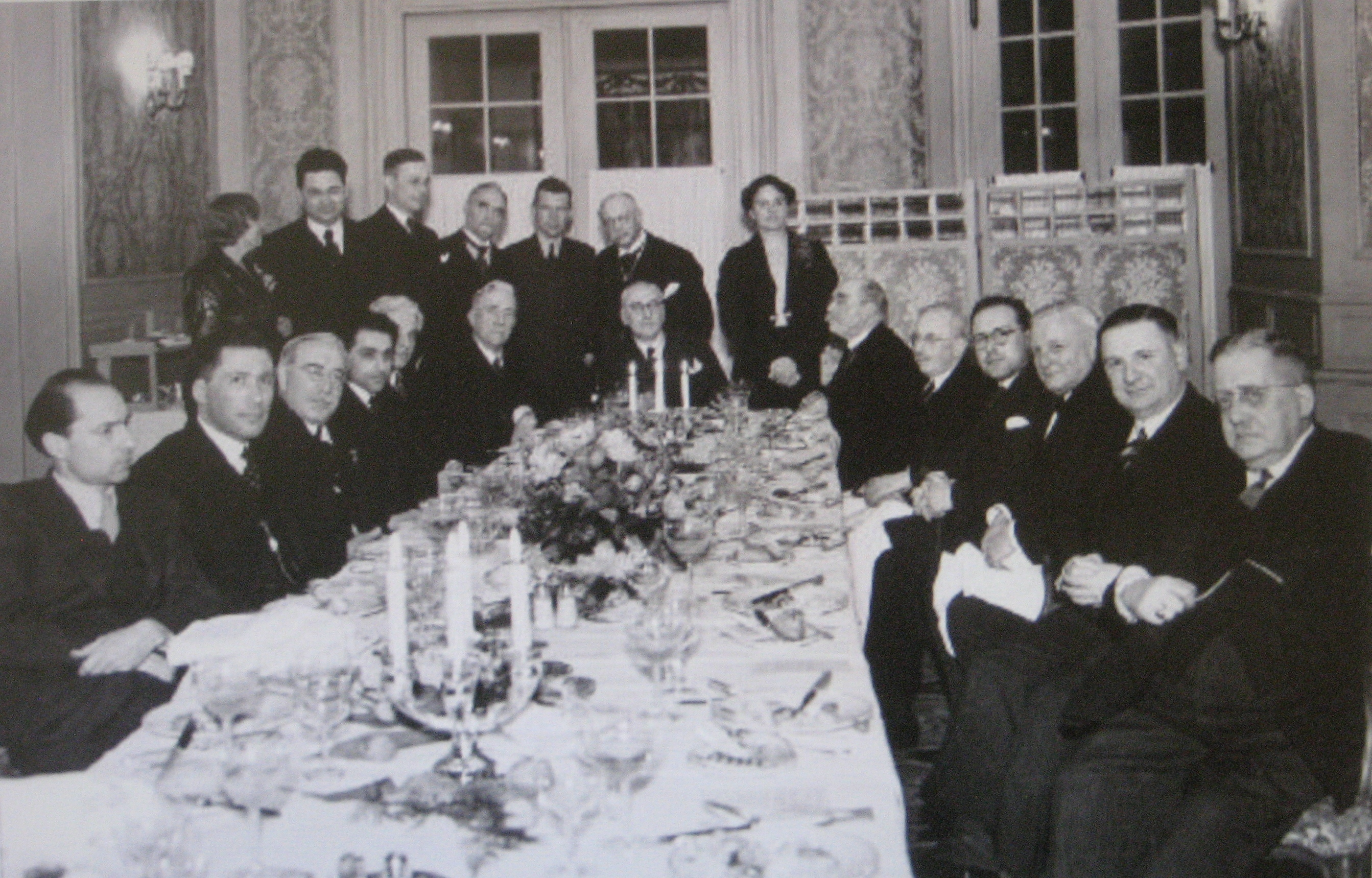 Foto van het diner, aangeboden door De Centrale Arbeiders- Verzekerings- en Depositobank aan het bestuur, de bibliothecaresse en de wetenschappelijke staf van het Internationaal Instituut voor Sociale Geschiedenis en de raad van commissarissen van De Centrale in hotel Victoria te Amsterdam ter gelegenheid van de officiële opening van het Instituut op 11 maart 1937. Zittend v.l.n.r. Arthur Lehning, G.J. Stoop, A. Harms, Baruch Sapir, C.M. Simonsz, Gerrit Willem Melchers, Nicolaas Willem Posthumus, Hajo Brugmans, Isaac Bennie Cohen, A.J.C. Rüter, Jan Oudegeest, Hans Stein en L. Hoejenbos. Staand v.l.n.r. Annie Adama van Scheltema-Kleefstra, Boris Ivanovič Nikolaevskij, Pieter Jan van Winter, Hendrik Bolkestein, H.B. Wiardi Beckman, Nehemia de Lieme en Jane de Iongh. Namen volgens beschrijving IISG uit 2012, dus terecht zonder Kernkamp en met Hoejenbos.